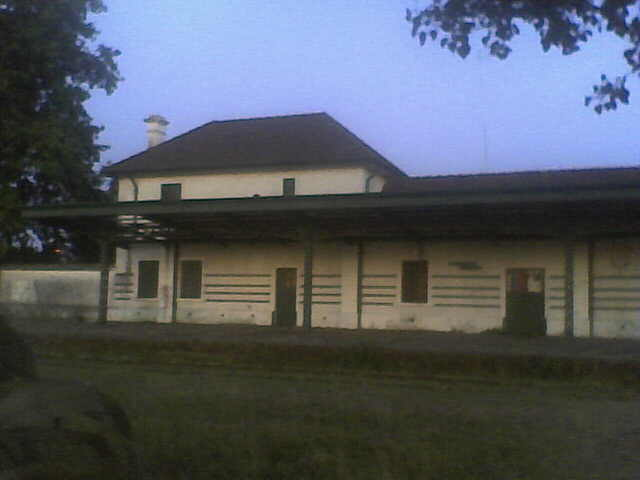 Vista del anden de la Estación San Vicente